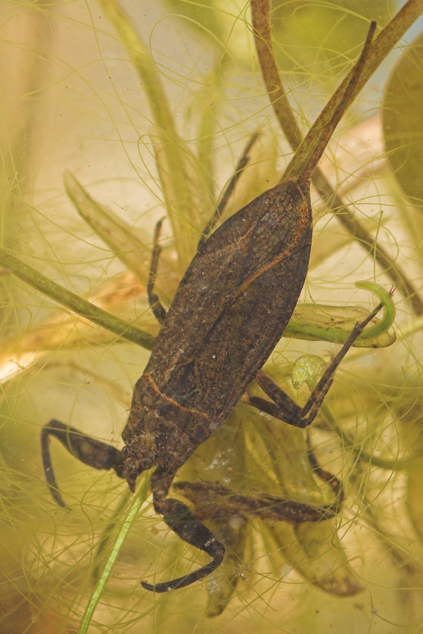 Wasserskorpion (Nepa rubra)